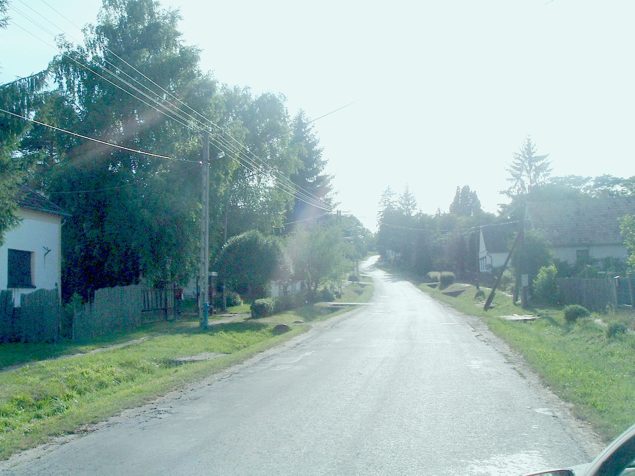 Andrásfa, Hungary